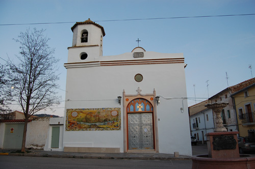 Faxha de iglesia de Casas del Río